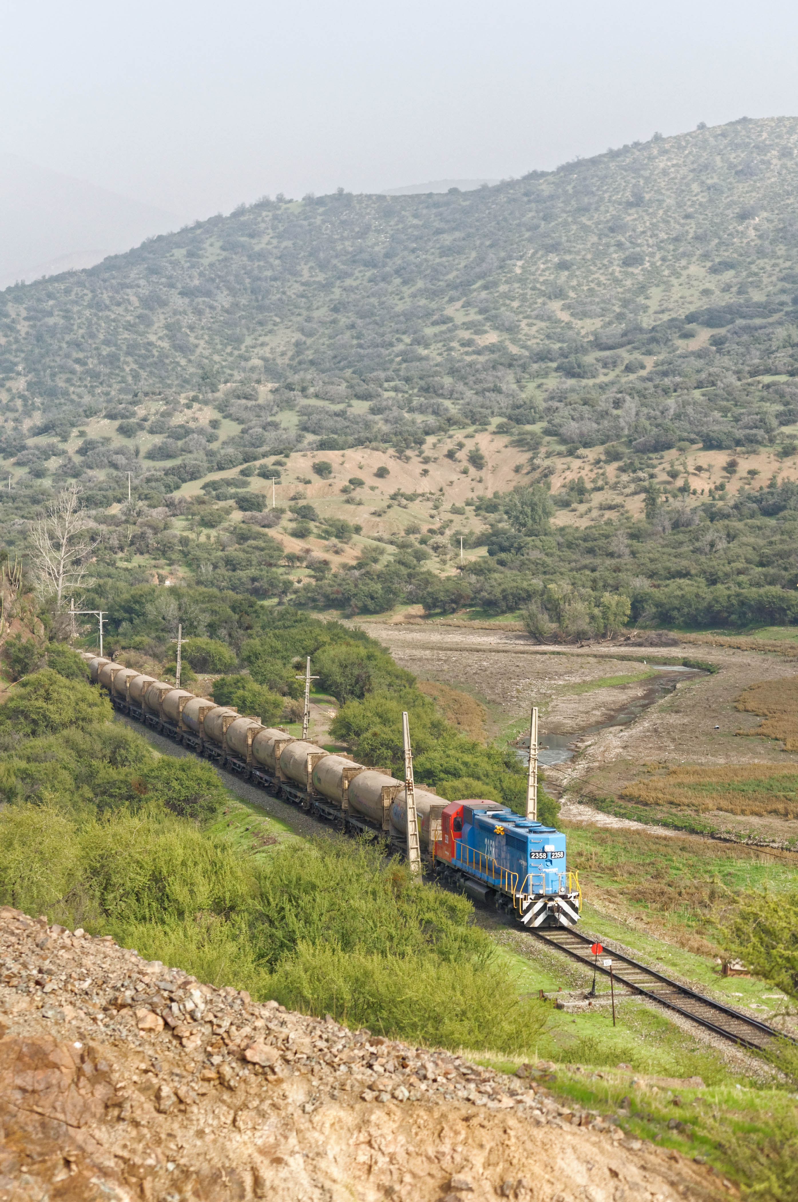 La bruma comenzaba a disiparse, y desde las alturas, se podia apreciar esta vista, del estero Rungue y su entorno. En la foto, la remosada D2358 al mando del basurero rumbo a Montenegro, en una fria mañana de otoño. Estacion Rungue, Mayo, 2016